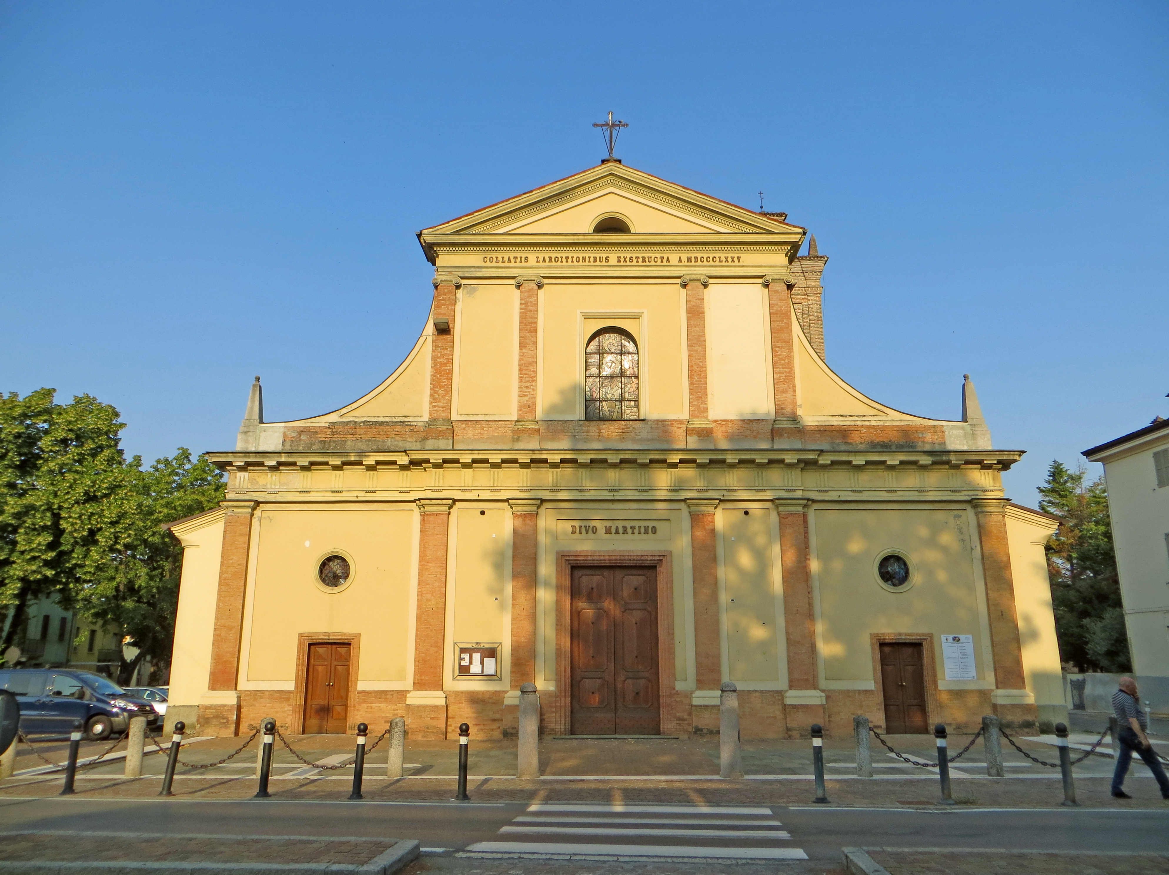 Chiesa di San Martino (Noceto) - facciata